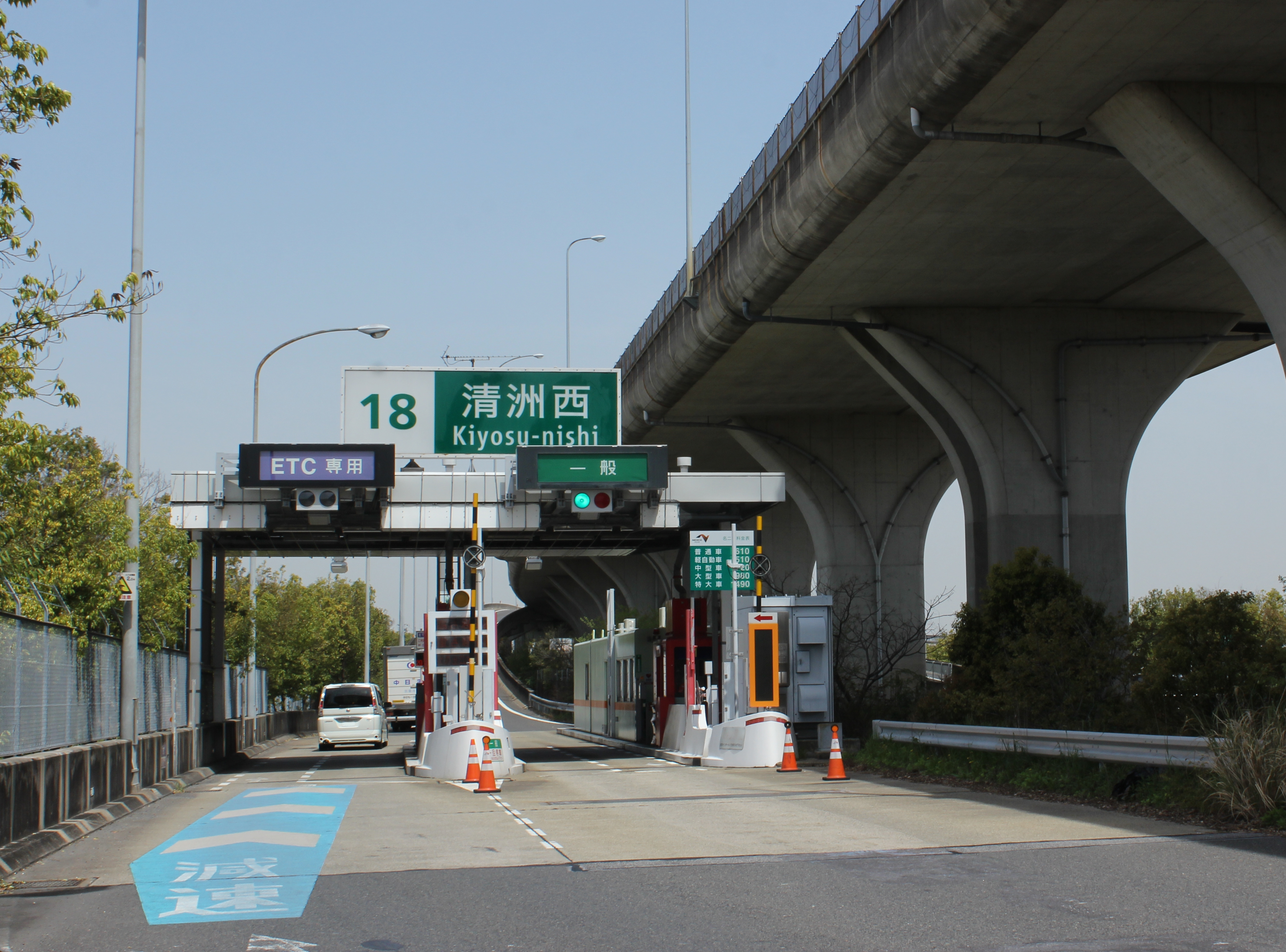 名二環（外回り、楠JCT方面）清洲西IC